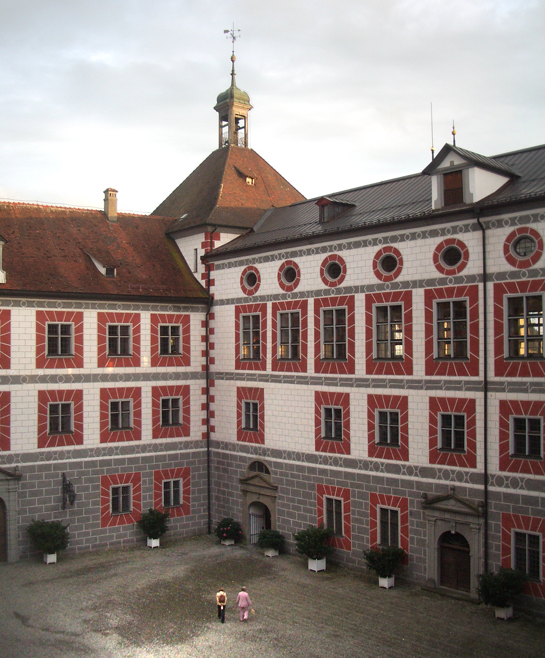 Wolfegg, Germany: Schloss Wolfegg, Innenhof